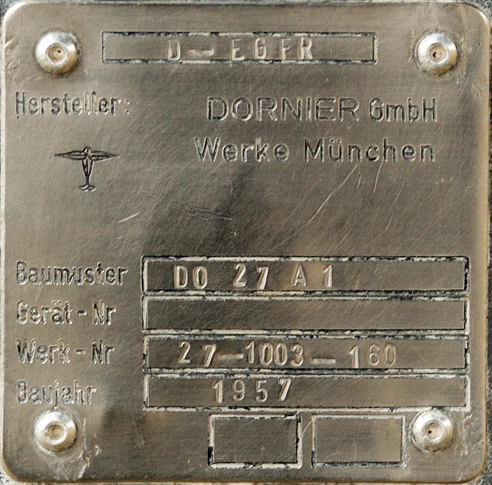 Fotoflugkurs Cuxhaven die Ju52